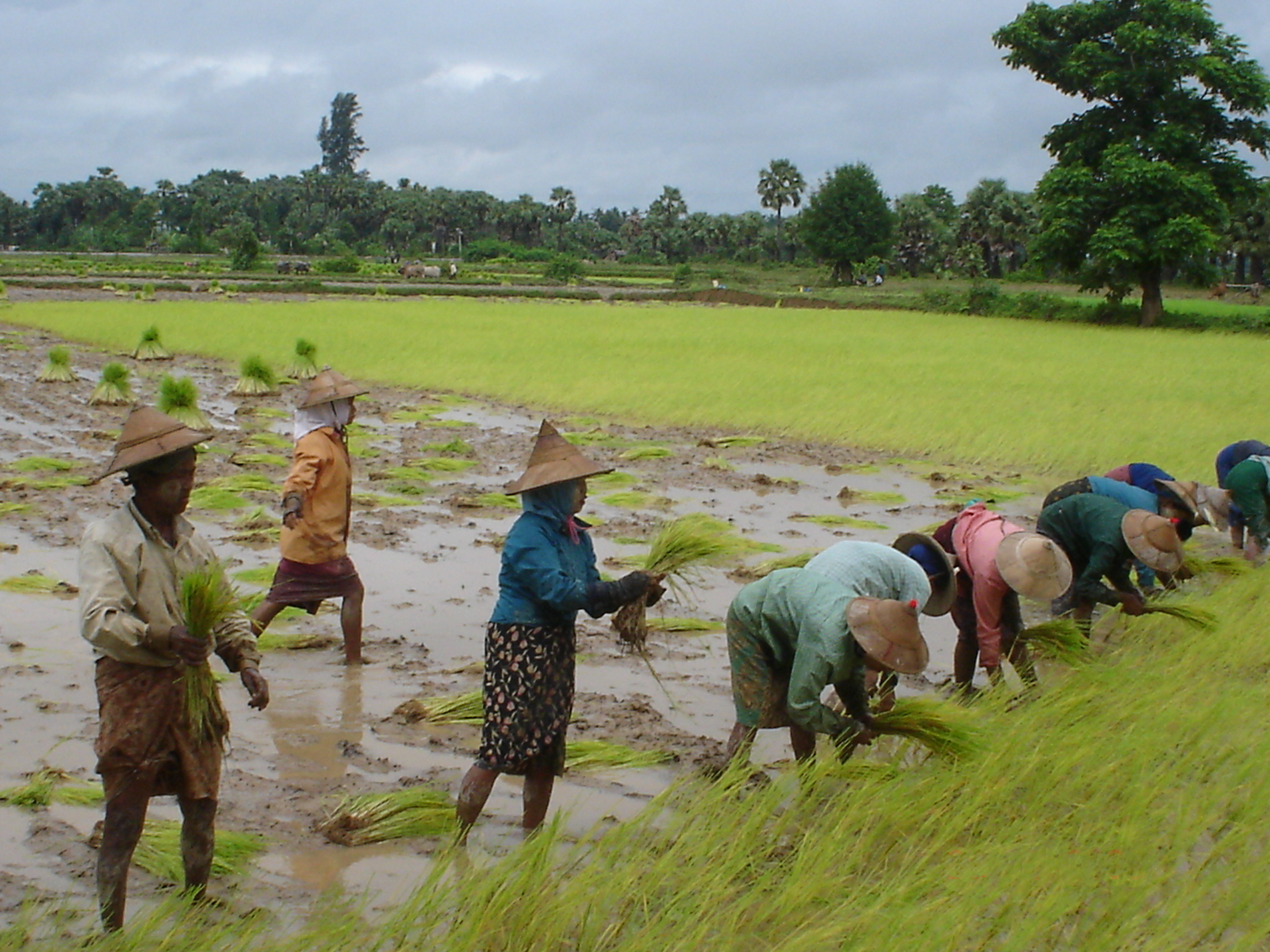 Rijstvelden Myanmar 2006